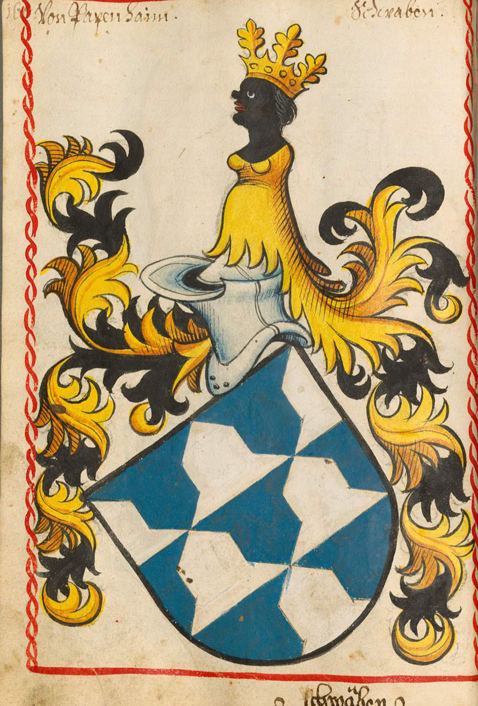 Scheibler'sches Wappenbuch, älterer Teil Pappenheim